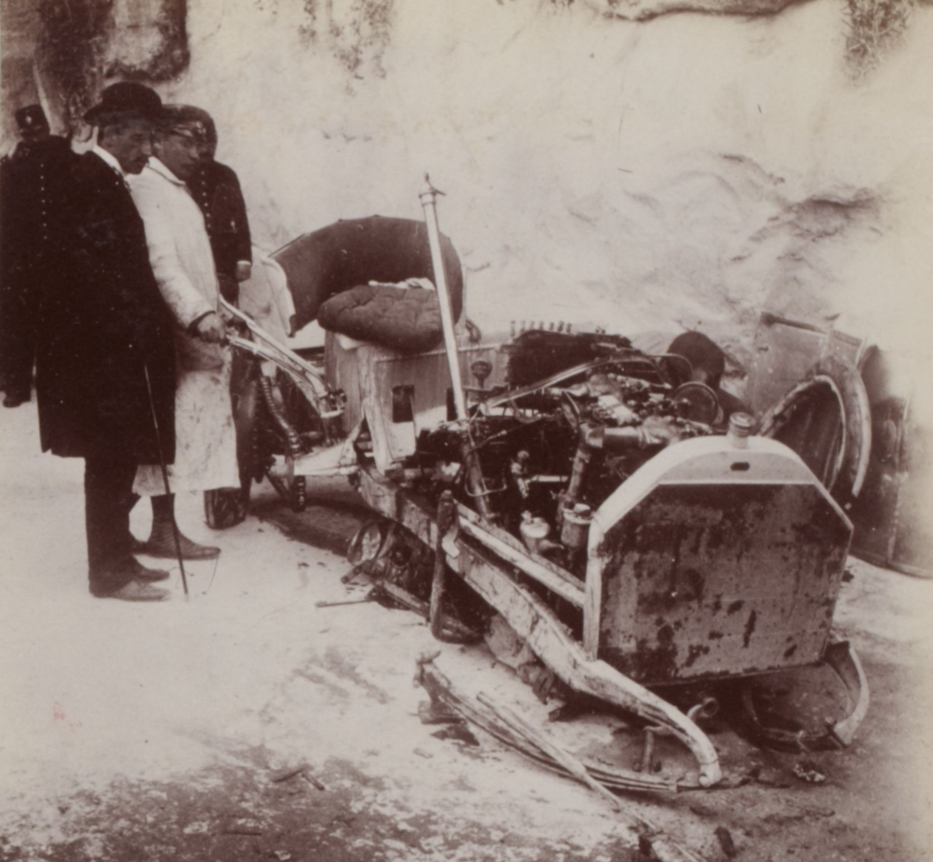 [Collection Jules Beau. Photographie sportive] : T. 20. Année 1903 / Jules Beau : F. 39v. [Quinzaine de Nice, Concours de tourisme, 1er avril 1903]